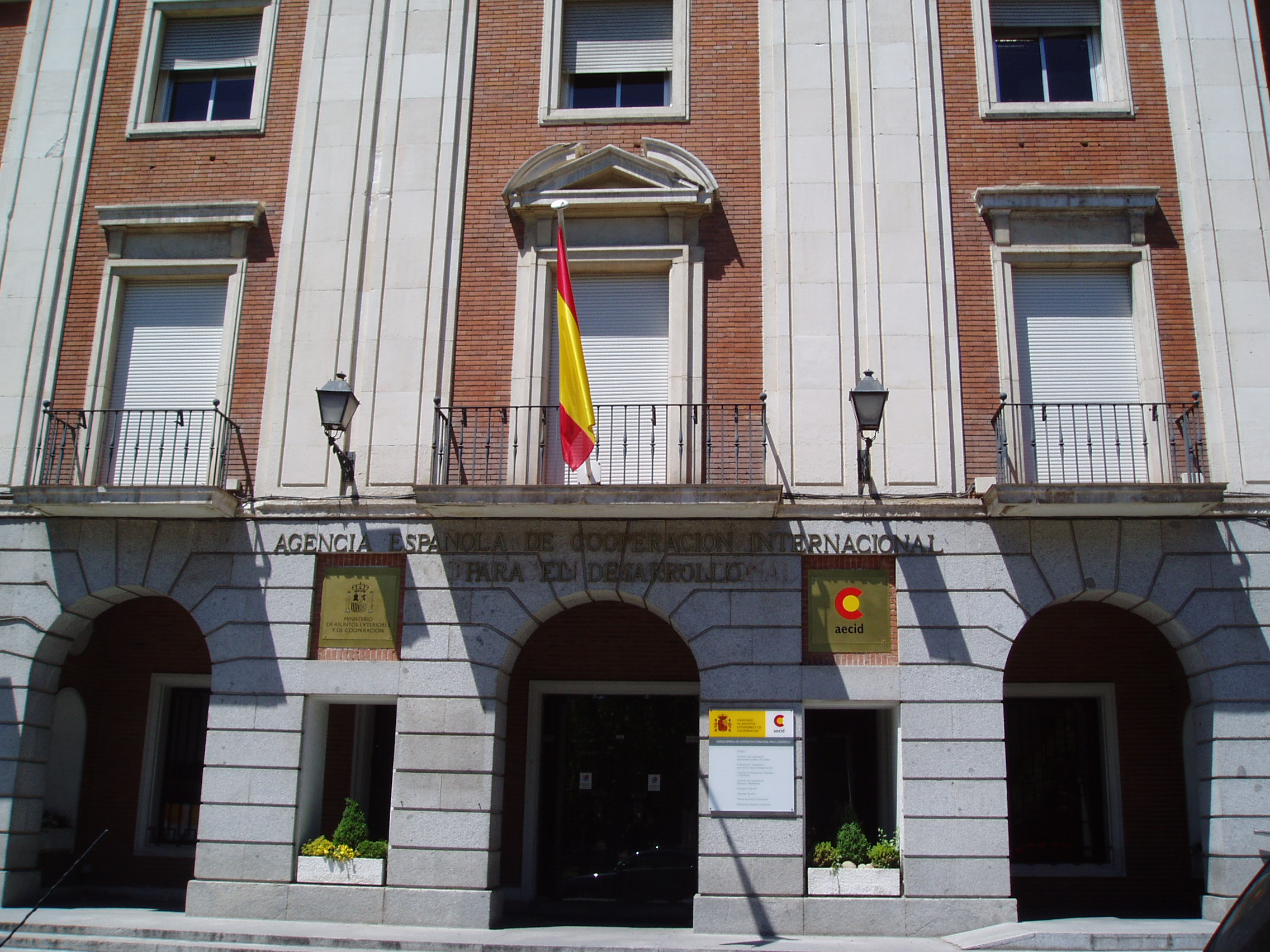 Sede de la AECID (Agencia Española de Cooperación Internacional para el Desarrollo) en Madrid, España.